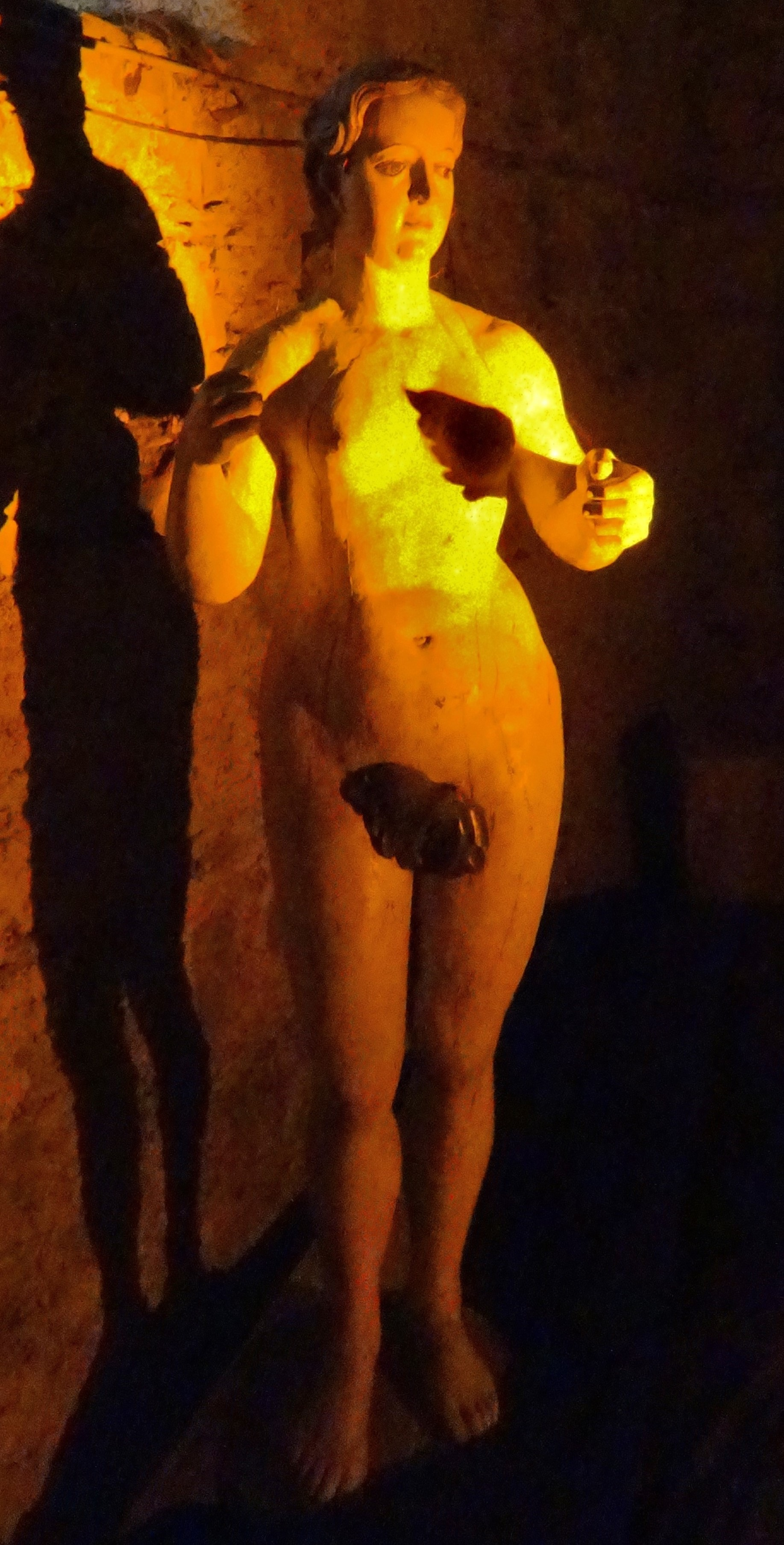 Burg Hochosterwitz, Statue der Margarete Maultasch